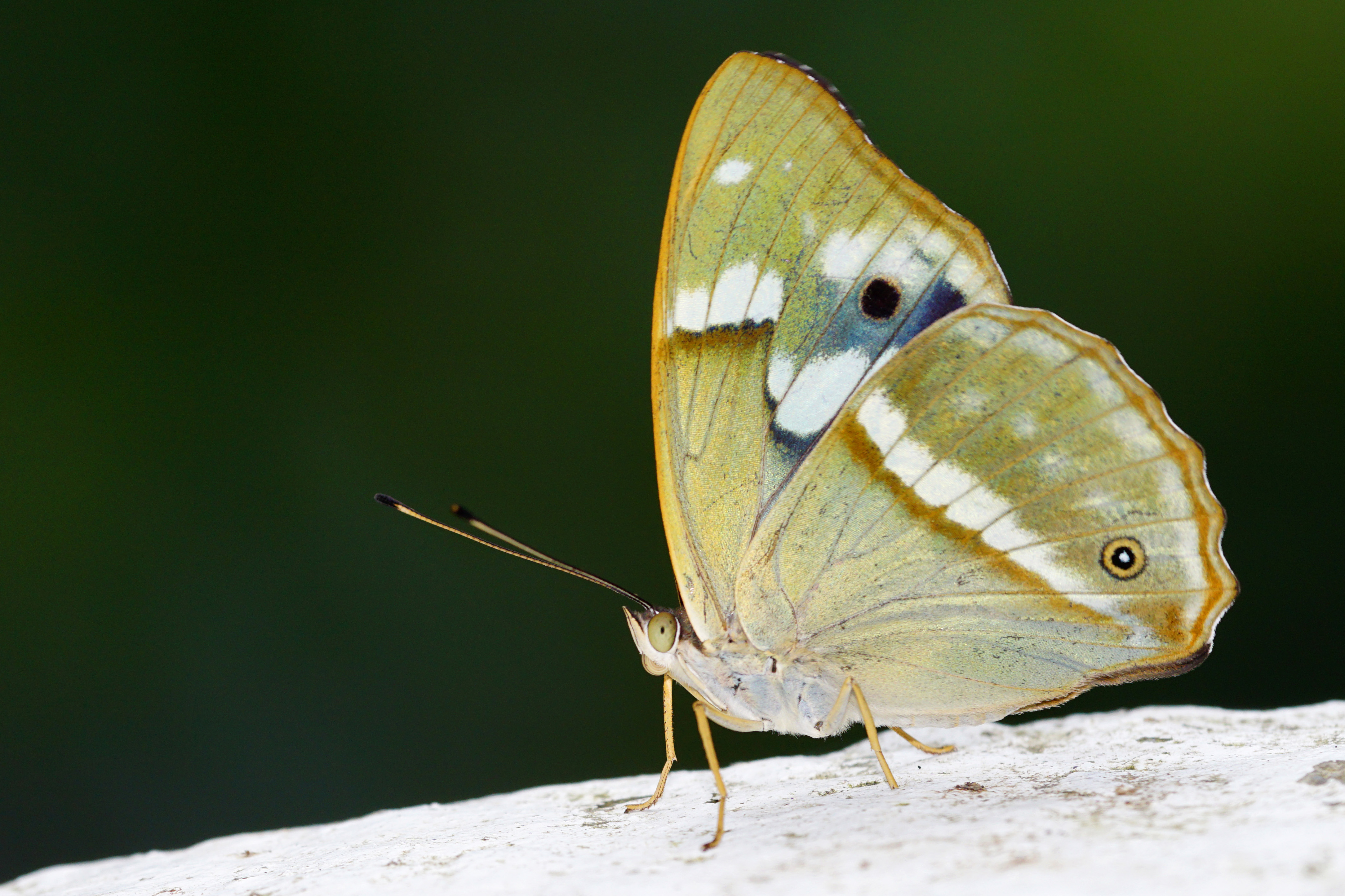 金鎧蛺蝶 Chitoria chrysolora 雌